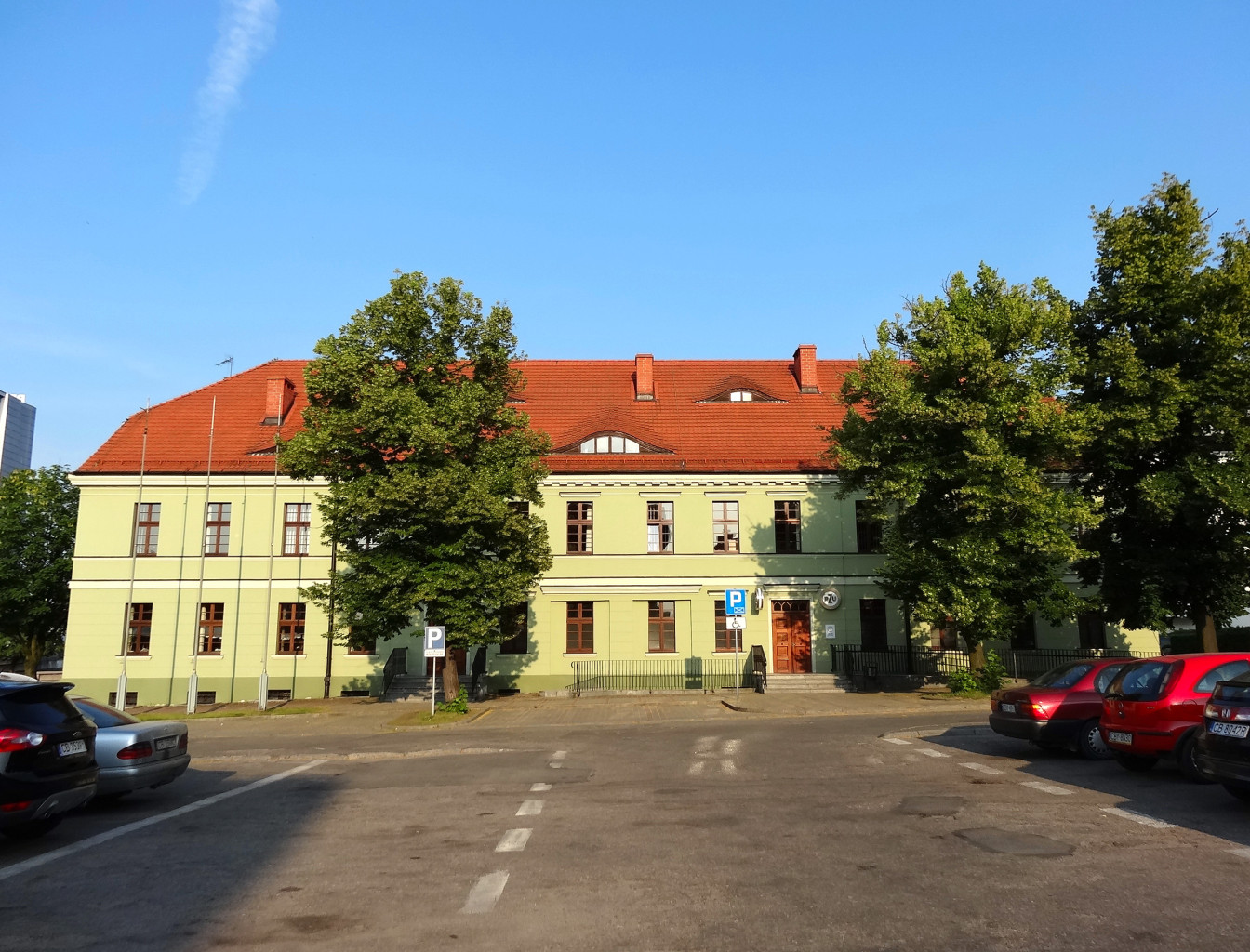 Budynek PZU Życie - dawny bud. administracyjny rafinerii cukru trzcinowego, zbud. w końcu XVIII w. nad Brdą w Bydgoszczy